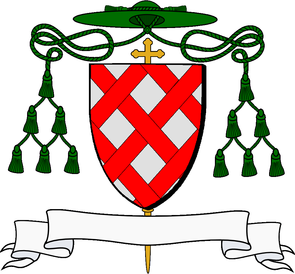 Plezek etre argant ha gwad